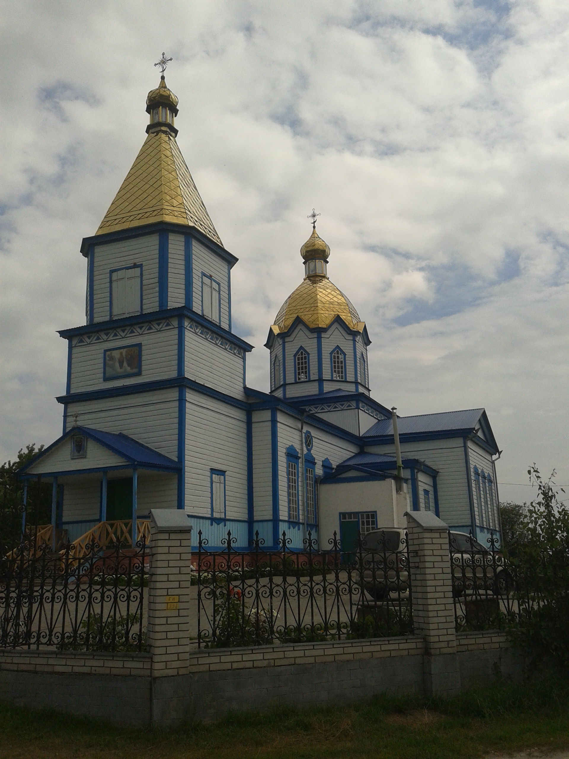 Покровська церква, Велика Димерка